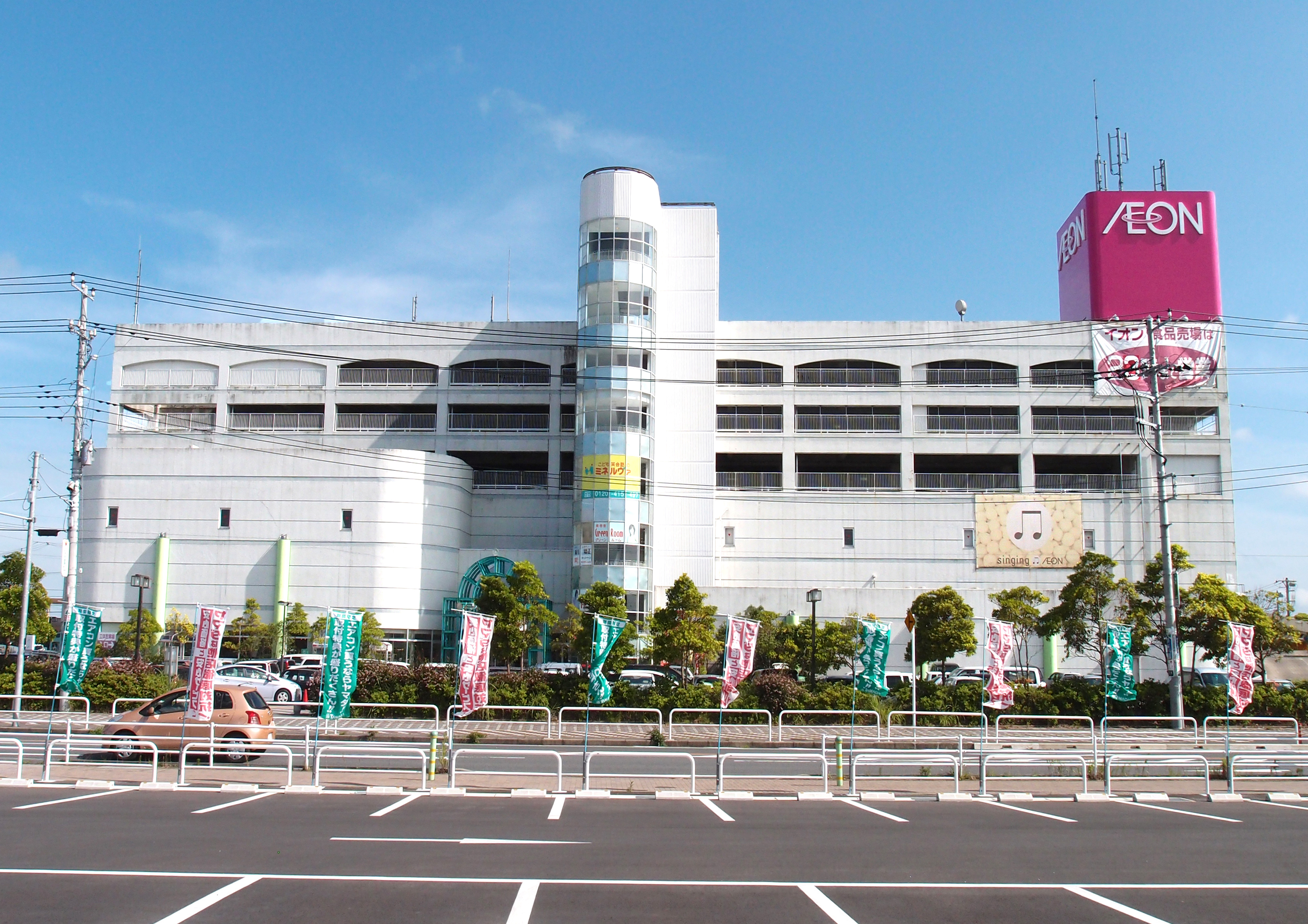 ヤマダ電機テックランド大網白里店の駐車場から撮影